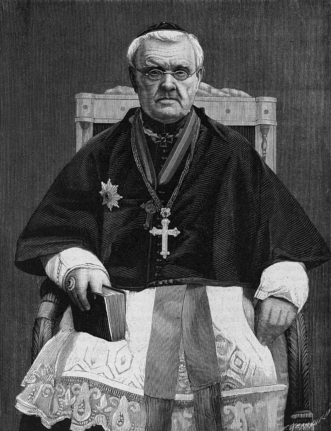 Католический епископ Антоний Фиалковский